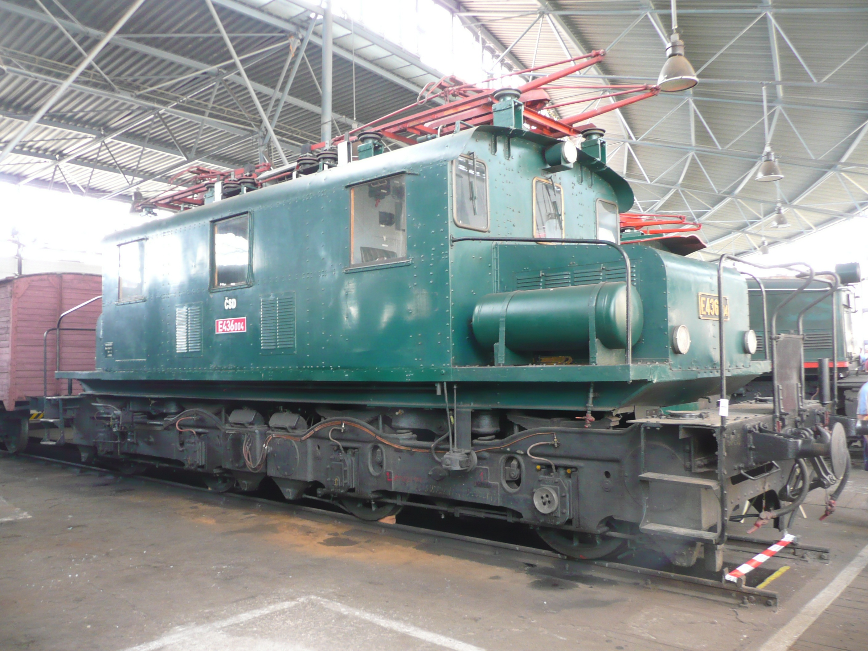 E 436.004 als Exponat des NTM im Heizhaus von Chomutov